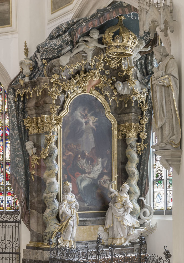 St. Jakob Straubing - Asamaltar